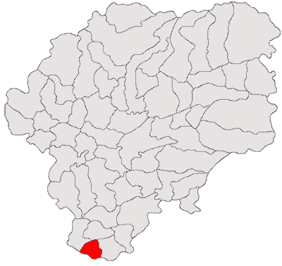 Categorie:Hărţi ale judeţului Bistriţa-Năsăud